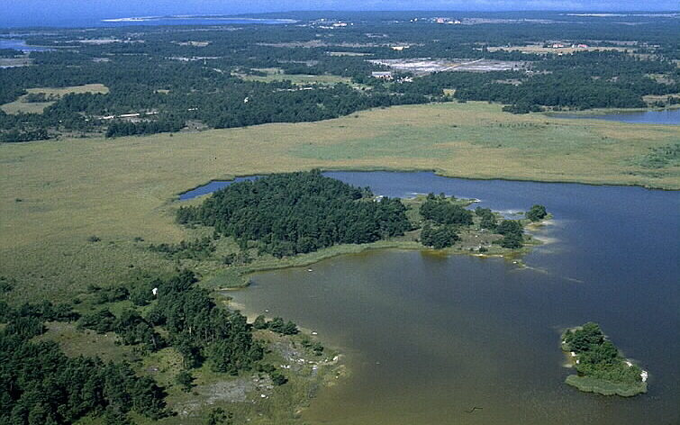 Från Mölnorträsk Motiv: Fårös västra kust Nyckelord: Flygbilder, Riksintressen Kategori: Kust- och skärgårdsmiljöFrån Mölnorträsk.